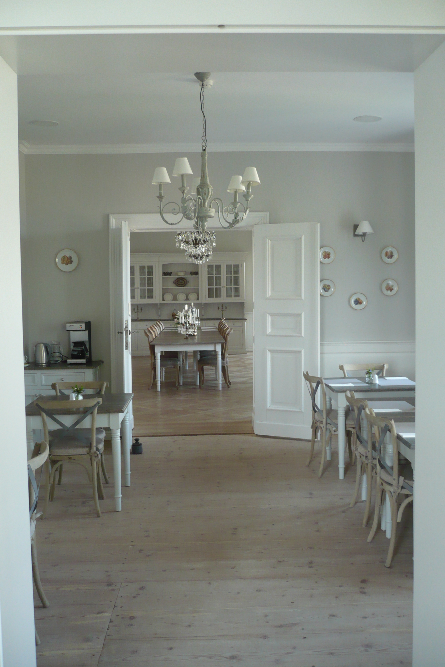 Kamieniec.Sale